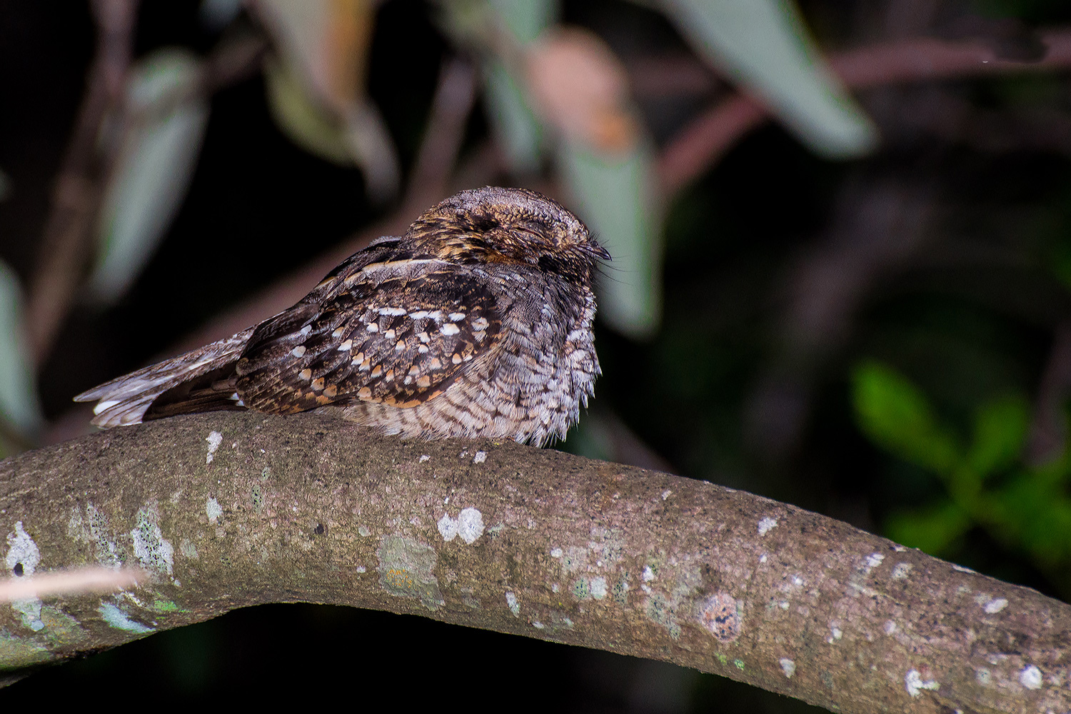 Foto realizada em uma mata ciliar próximo à cidade de Iracemápolis-SP no dia 24/11/2015, por volta das 23:42. Nome Cientifico: Setopagis parvula. Nome Inglês: Little Nightjar. Ave de hábitos noturnos, costuma ficar a maior parte do tempo no chão, se alimentando de pequenos insetos. Encontram-se registros dessa ave em todo território nacional, Venezuela, Bolívia e Argentina. Migratória.